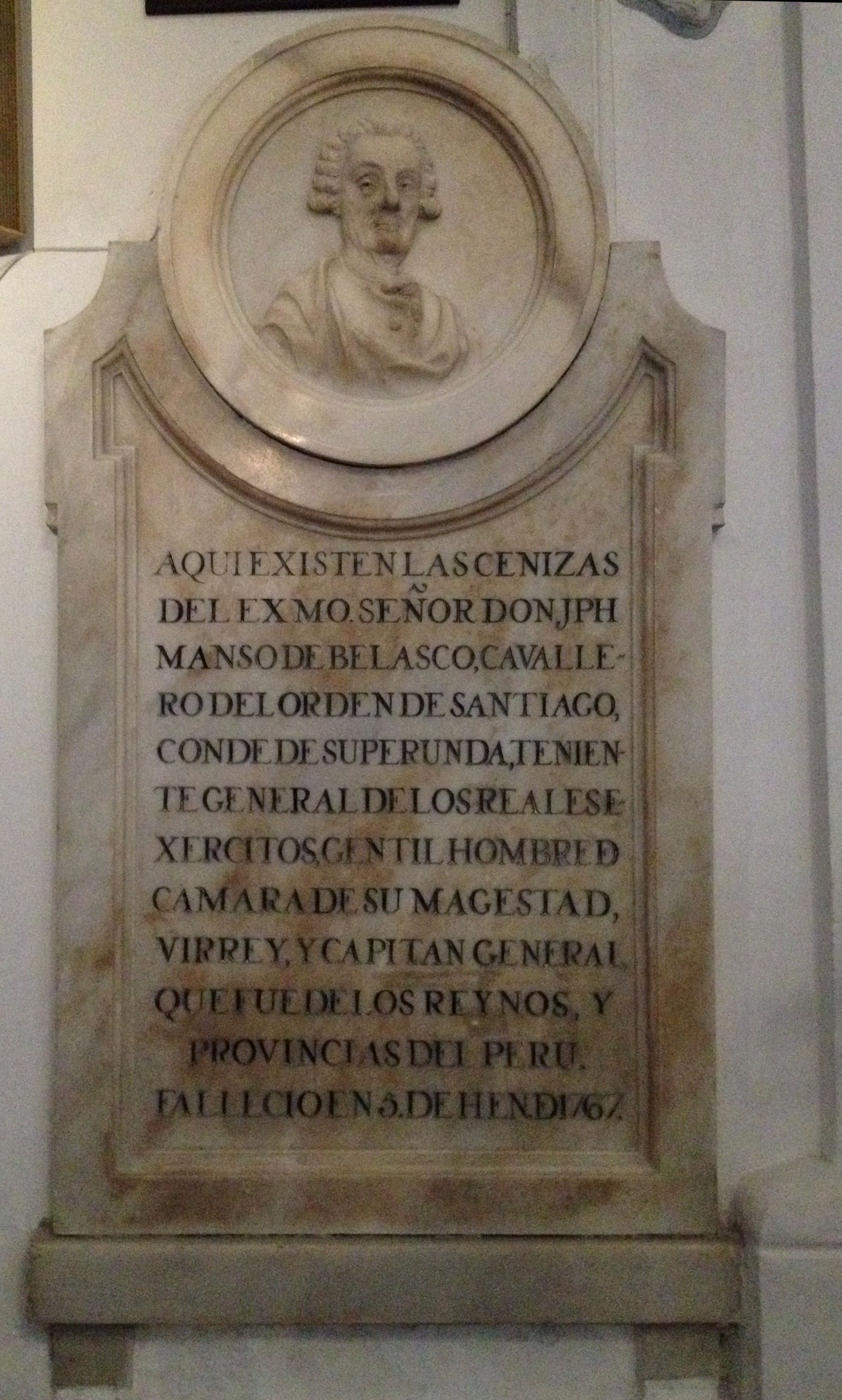 Fotografía de la tumba que guarda los restos del Conde de Superunda, localizada en la Iglesia de San Pedro de la ciudad de Priego de Córdoba.